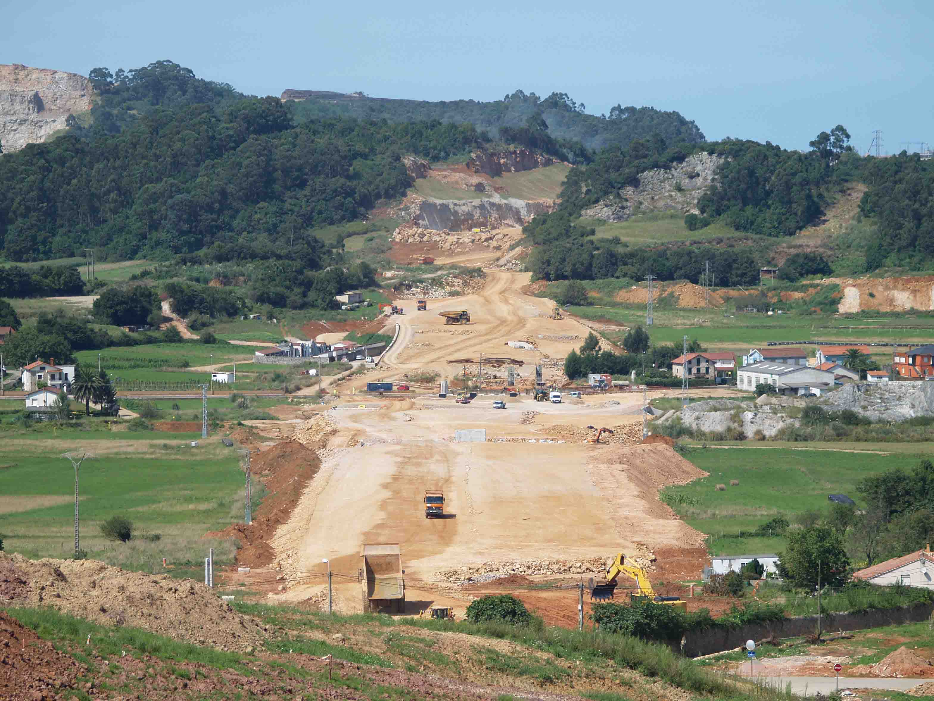 Construcción de la autovía "Ronda Bahía" a su paso por Revilla de Camargo (boca norte Túnel Morcilla).